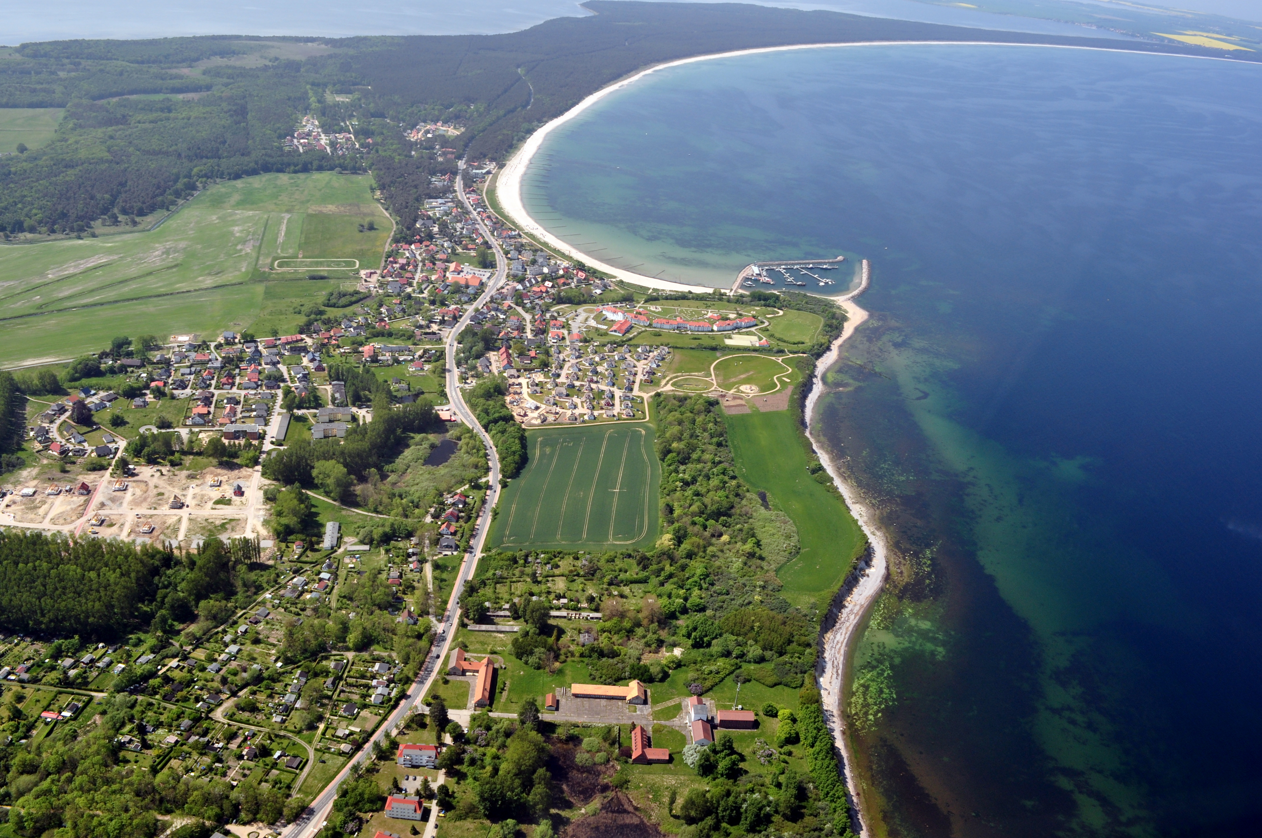 Die Bilder wurden von mir während eines einstündigen Rundflugs ab Flugplatz Güttin am 21. Mai 2011 aufgenommen. Die Bildbeschreibung steht im Dateinamen. Aufgenommen mit einer Nikon D5000 durch das Seitenfenster des Flugzeugs.